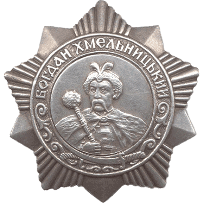 Орден Богдана Хмельницького 3 ступеню (СРСР)